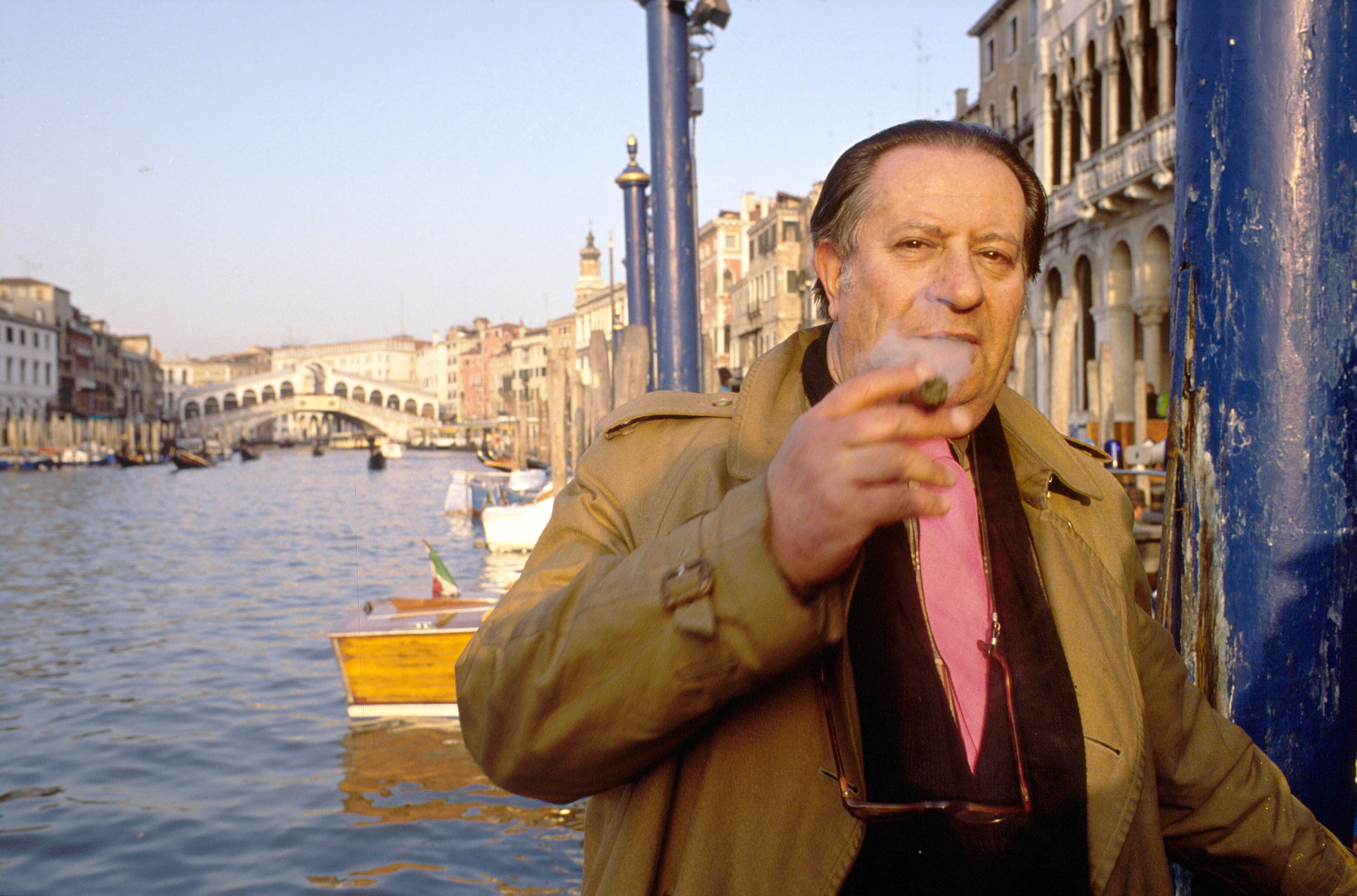 Il regista Tinto Brass a Venezia